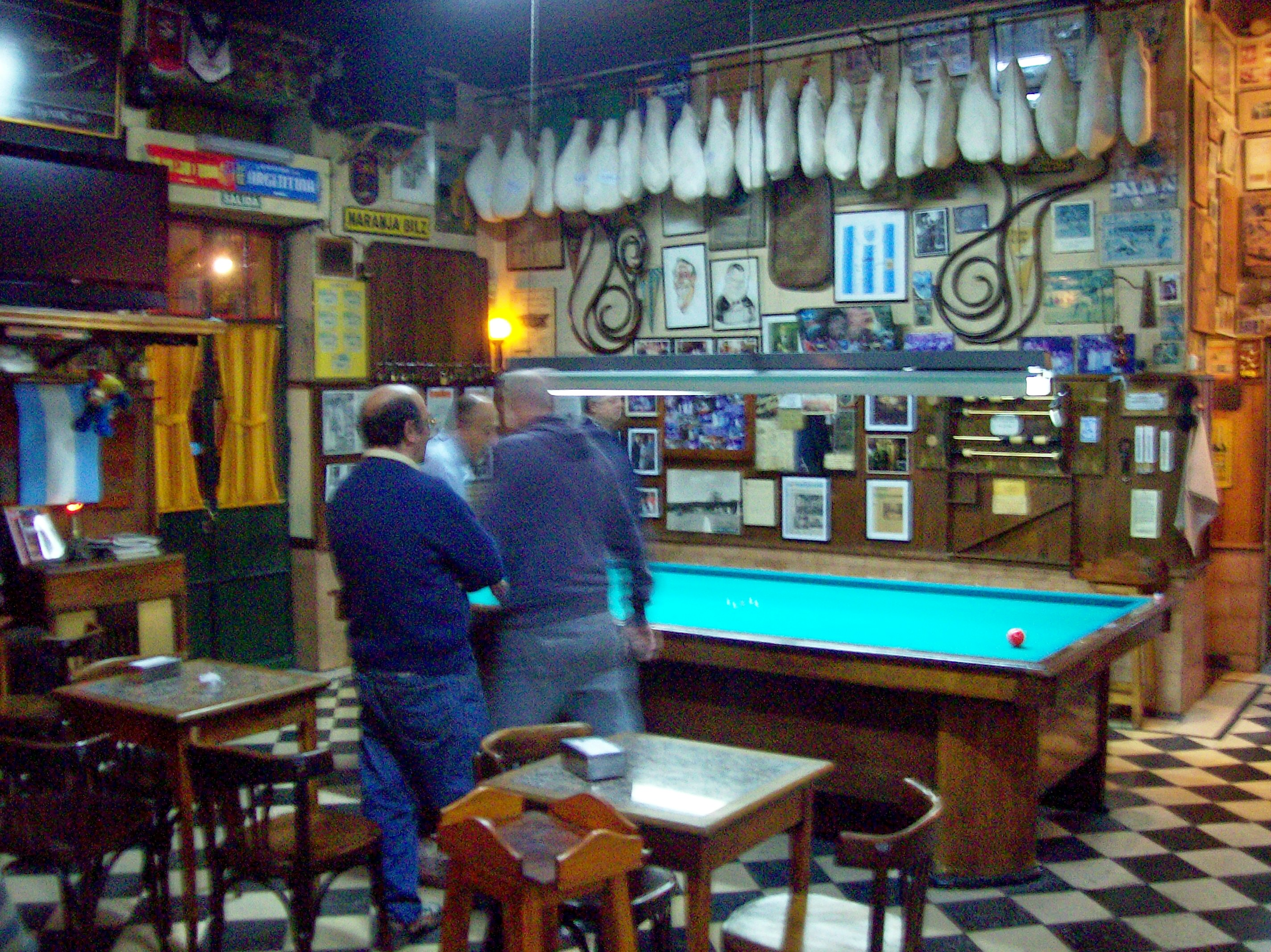 Salón principal, en el Café de García, Calle Sanabria 3302 (esquina con José P. Varela) Buenos Aires, Argentina.